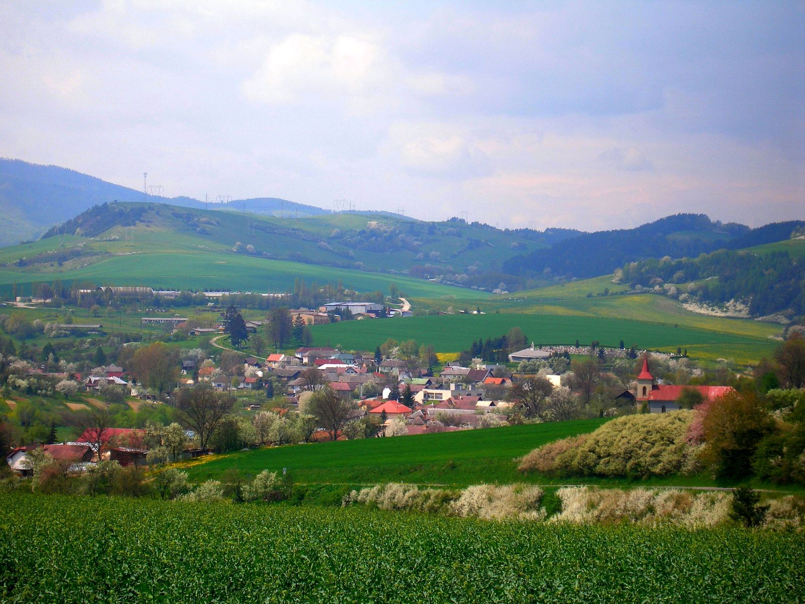 Obec Sedlice okres Prešov región Šariš, Šarišská vrchovina